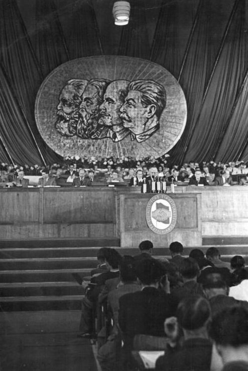 III.Parteitag der SED vom 20.-22.7.1950. Vom 20.-22.7.1950 findet in Berlin in der Werner-Seelenbinderhalle der III.Parteitag der Sozialistischen Einheitspartei Deutschlands statt.UBz: Während des Referates von Wilhelm Pieck. Aufn.: Illus-Quaschinsky Be. 7294-50 24 20.7.50